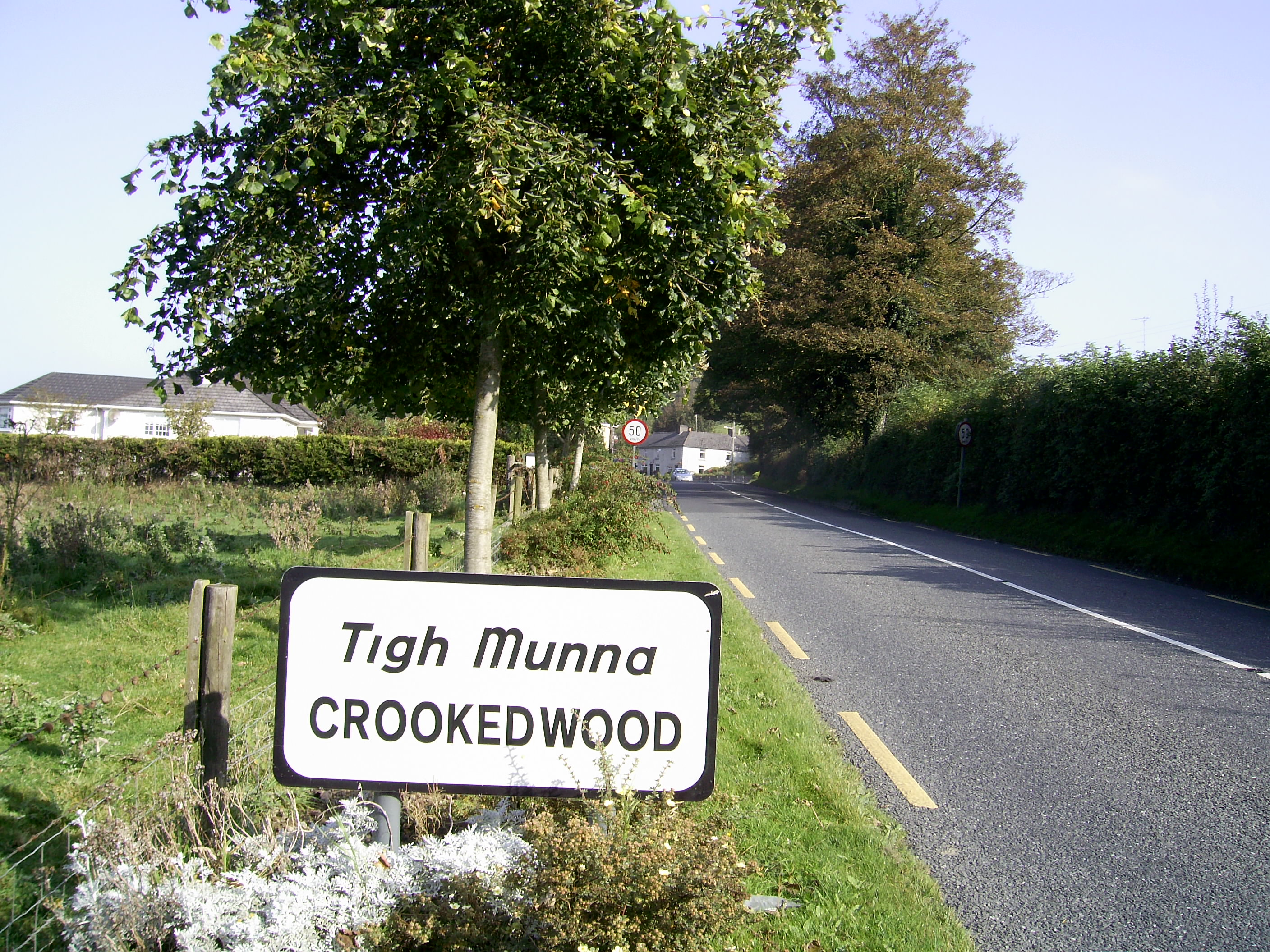 Paneau Crookedwood